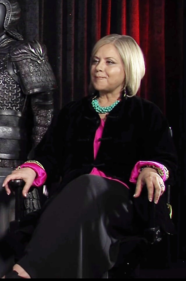 Mayes Rubeo vistió y desvitió a Matt Damon en 'The Great Wall' Copyright Dulce Osuna & Mayes Rubeo, la vestuarista mexicana más exitosa de Hollywood que vistió y desvitió a Matt Damon en 'The Great Wall', en cines ya